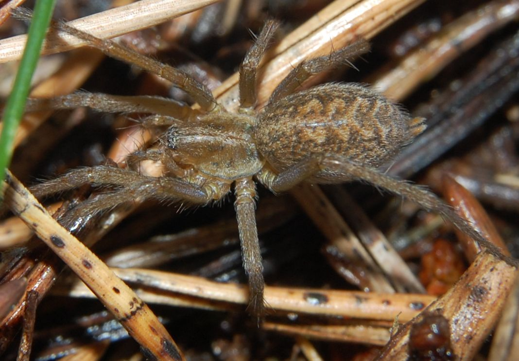 Tegenaria agrestis, female, det. by K.-H. Kielhorn, Berlin